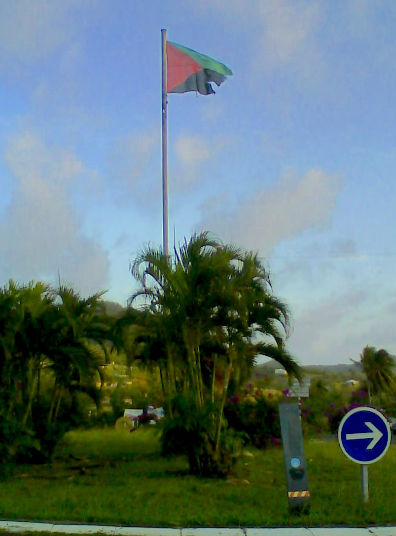 drapeau à l'entrée de Sainte-Anne (Martinique). Un drapeau identique est également planté au centre d'un rond point à la sortie de Sainte-Anne.